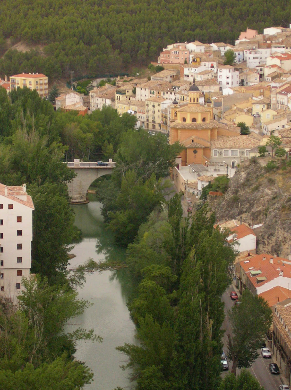 FOTO DEL RIO JUCAR HECHA POR MI EN JULIO 2005